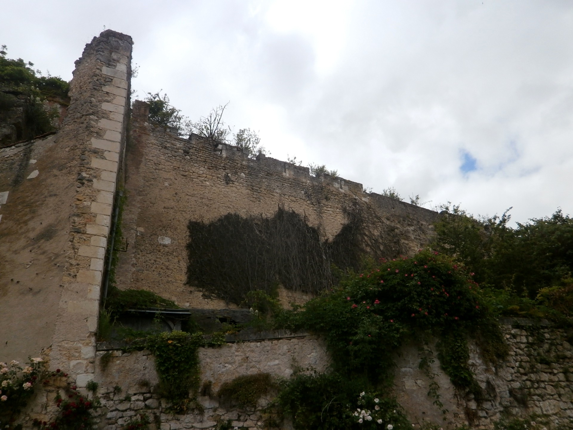 Vestiges des créneaux de l'enceinte du château de Montrésor